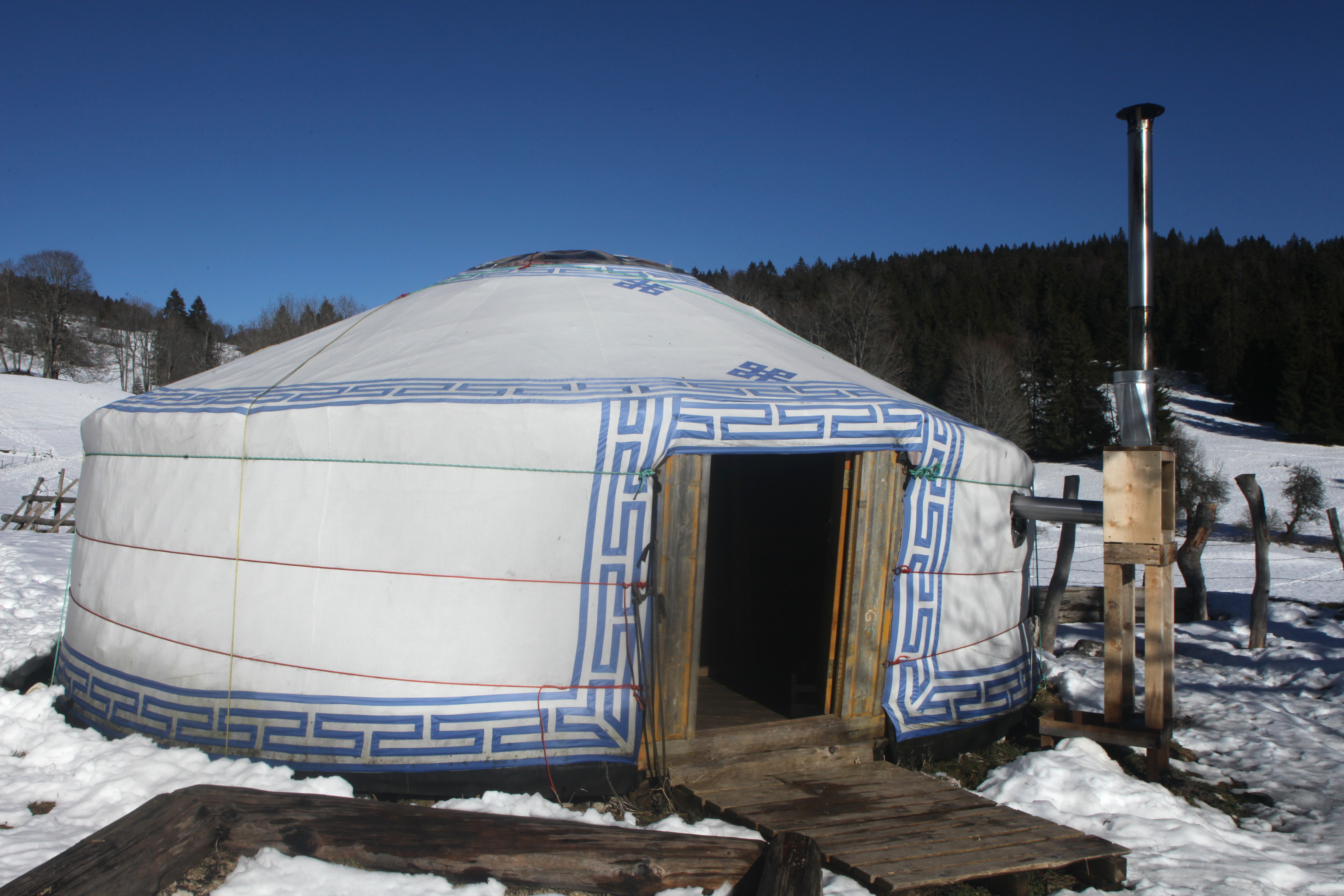 Yourte à la Petite-Échelle.